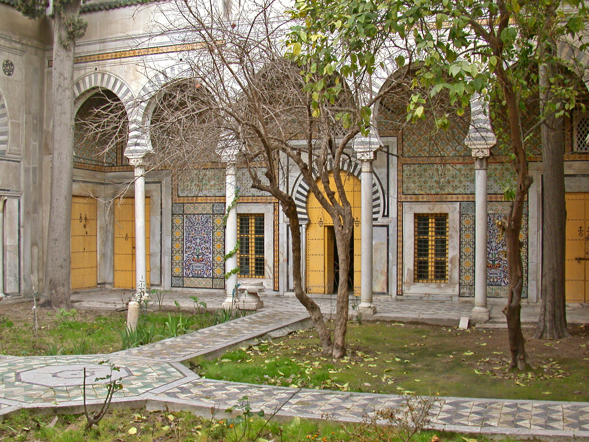 Le Dar Othman est un palais du XVIe siècle qui abrite les bureaux de la conservation de la médina de Tunis.